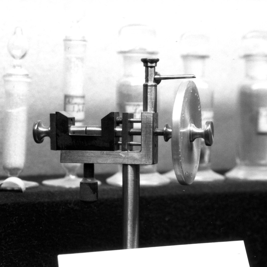 Radioconducteur à pression variable construit dans le laboratoire de Branly